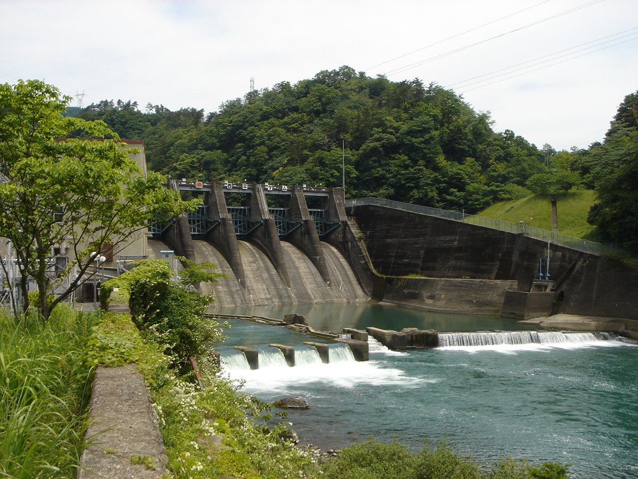 Nishi daira dam(西平ダム),Ibi-rever(揖斐川),Ibigawa,Gifu,Japan(岐阜県揖斐川町)で撮影